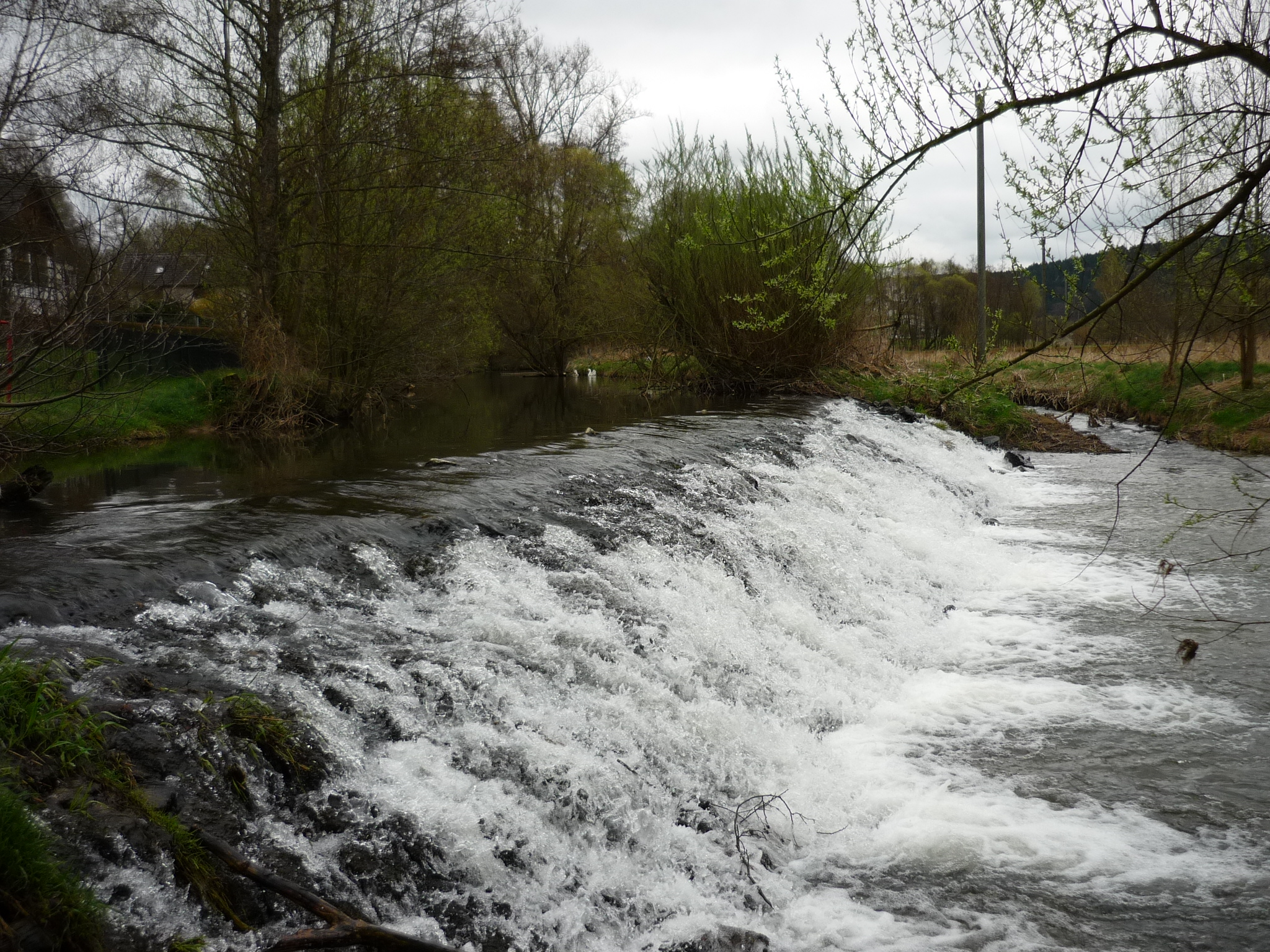 Michelbacher Wehr